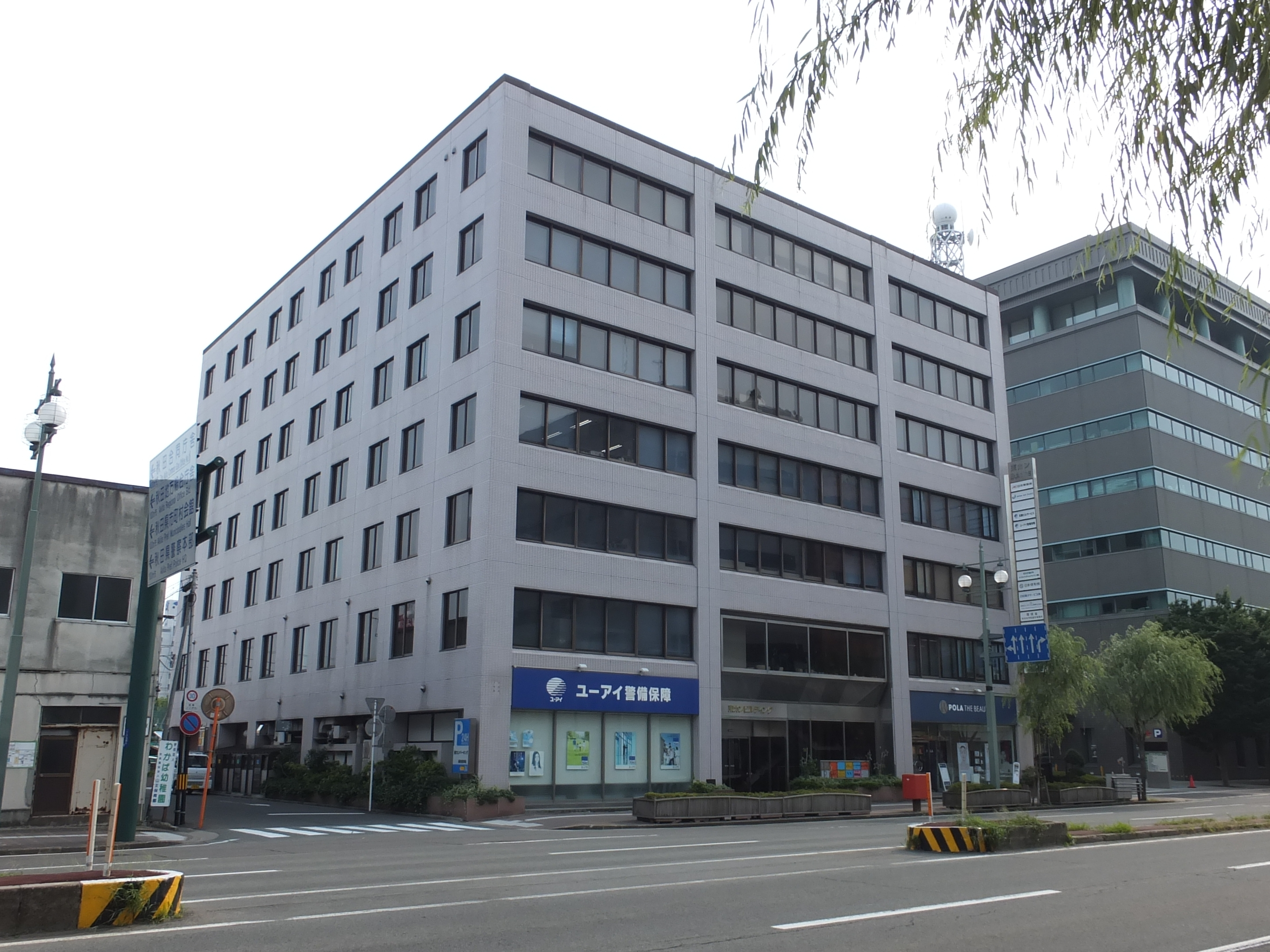 秋田市山王、東カンビルディング。サッカーJ3リーグ、ブラウブリッツ秋田のクラブ事務所が入居する。